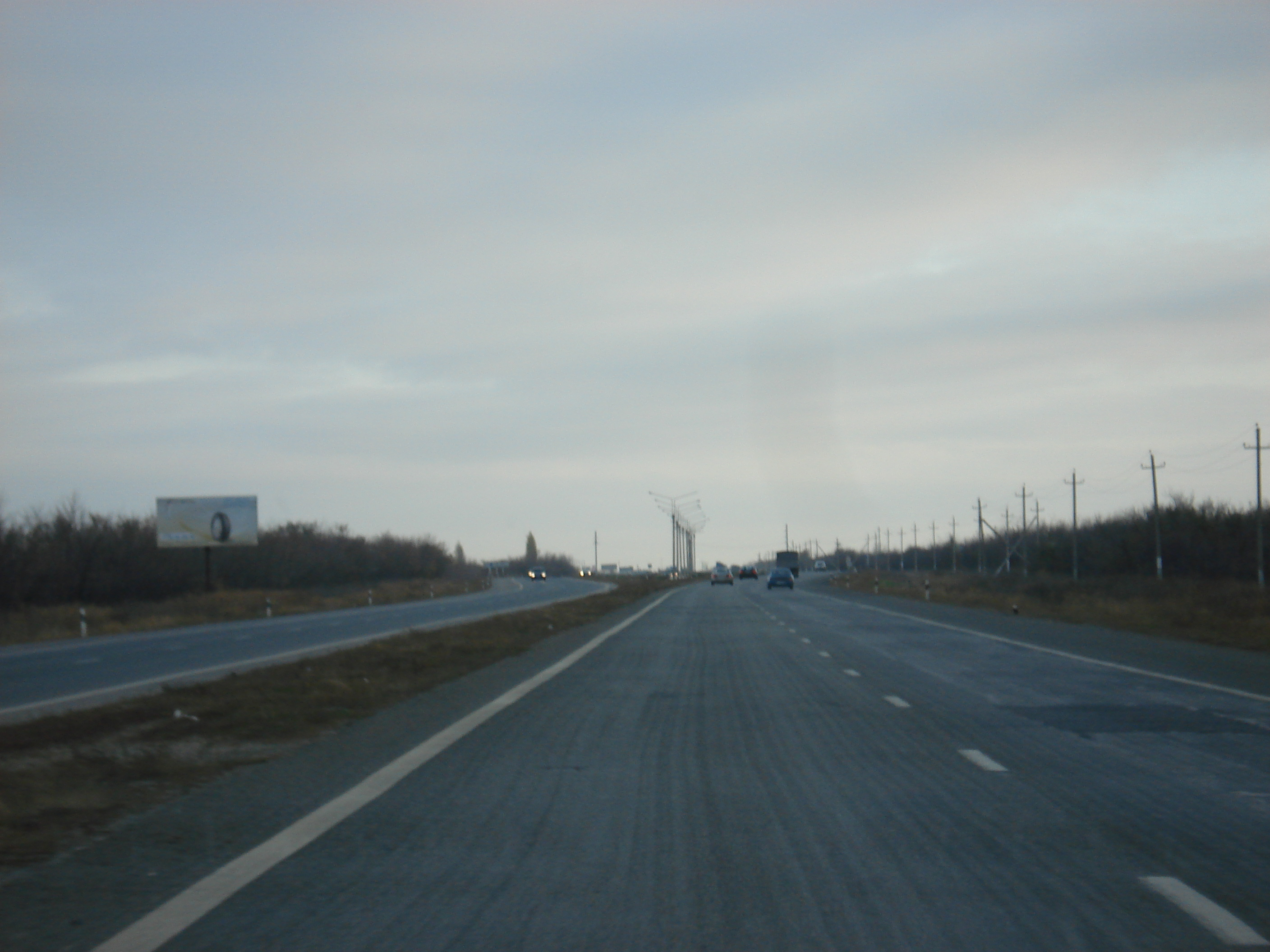 Автомагистраль М6 на подъезде к Волгограду